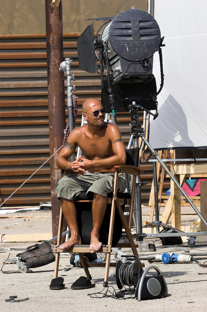 Фёдор Бондарчук во время съёмок "Обитаемого острова"